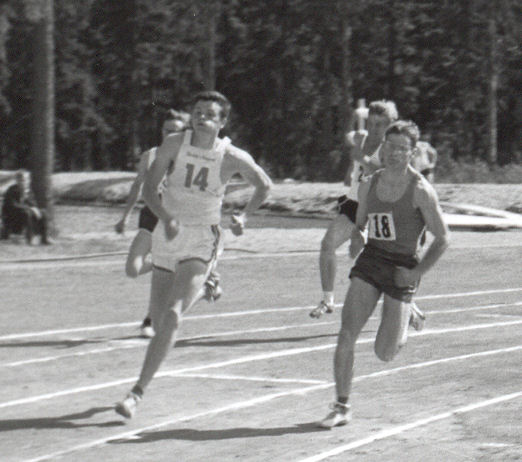 Torsten Brander as sportsman